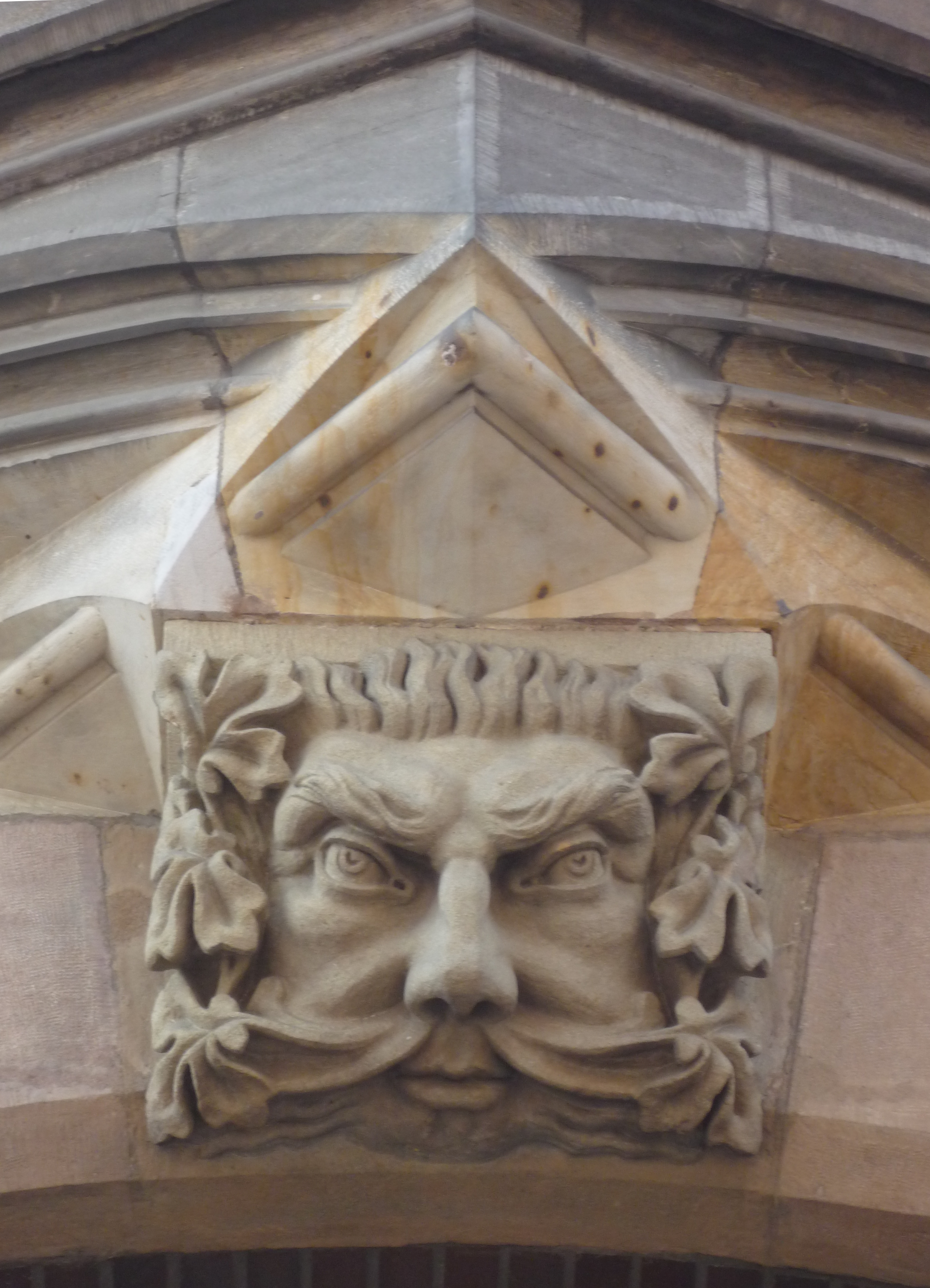 Berglerova vila - obličej